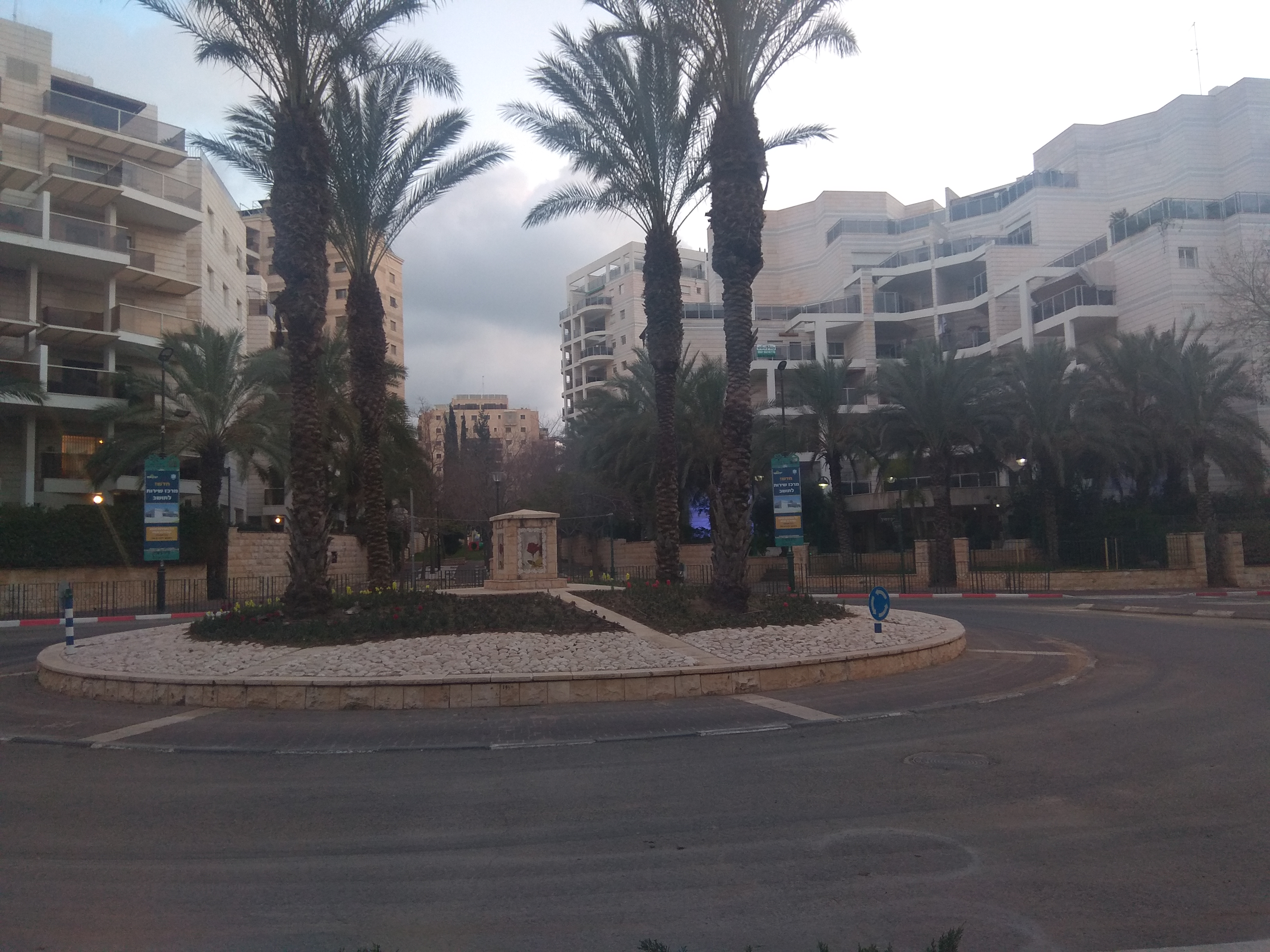 גבעת הרקפות